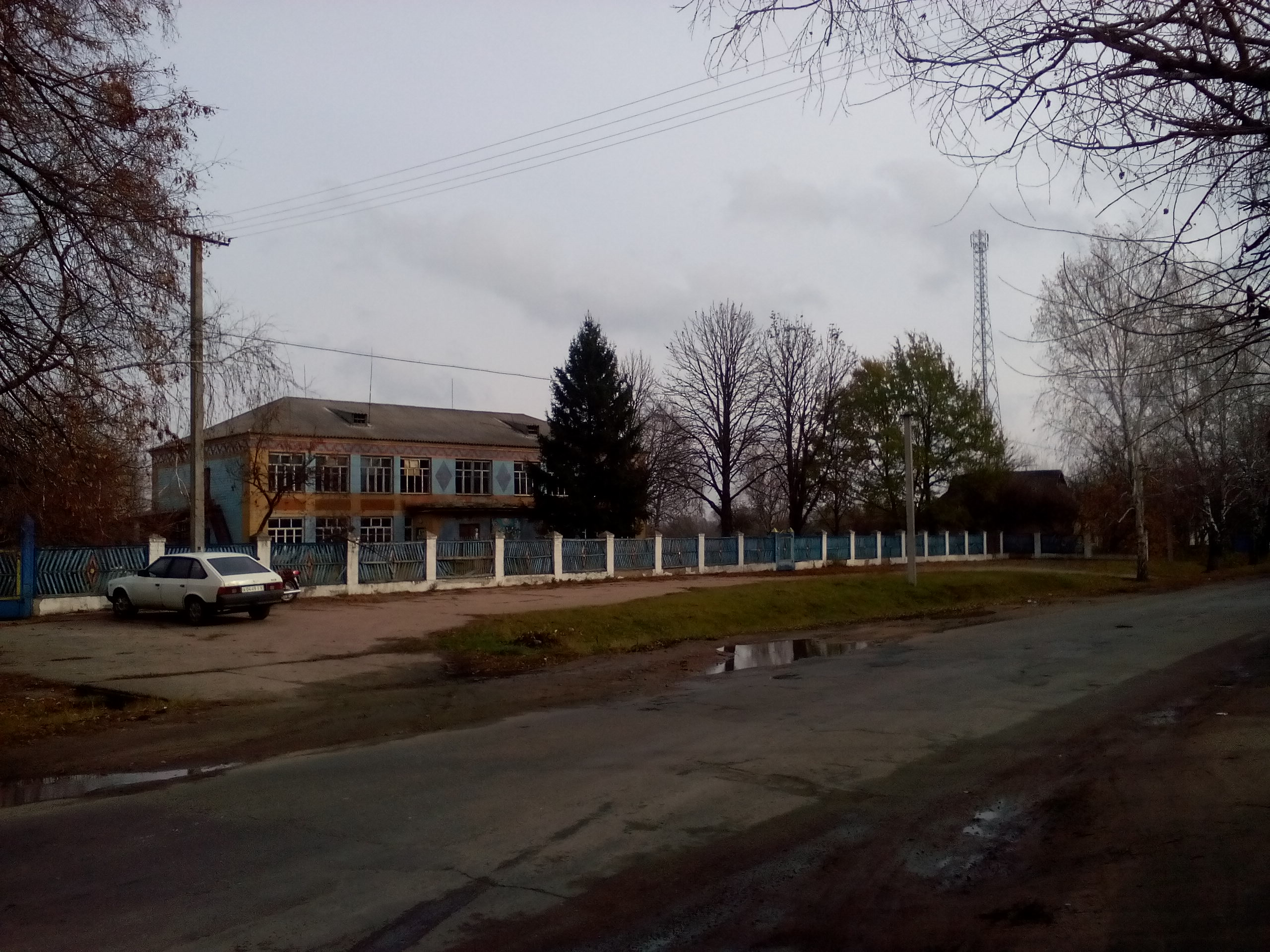 Село Куцеволівка Онуфріївського району Кіровоградської області